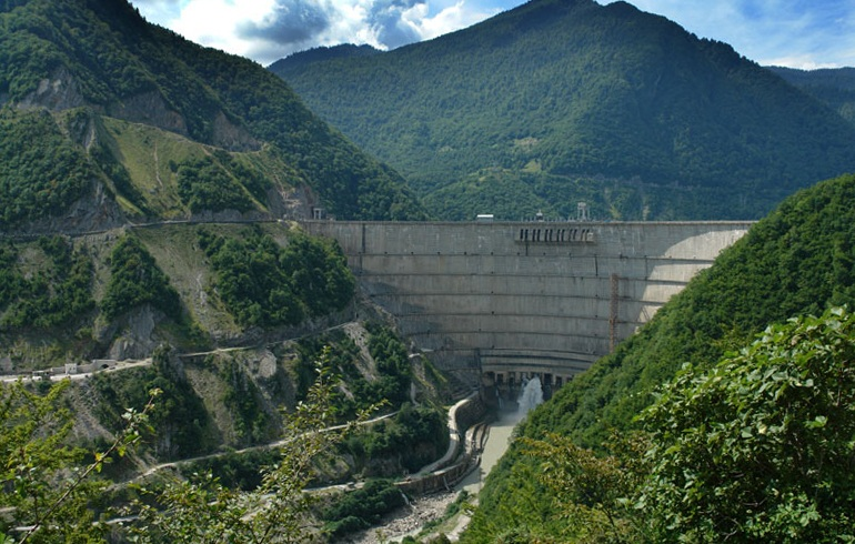 Enguri-Staumauer, Region Swanetien, Georgien